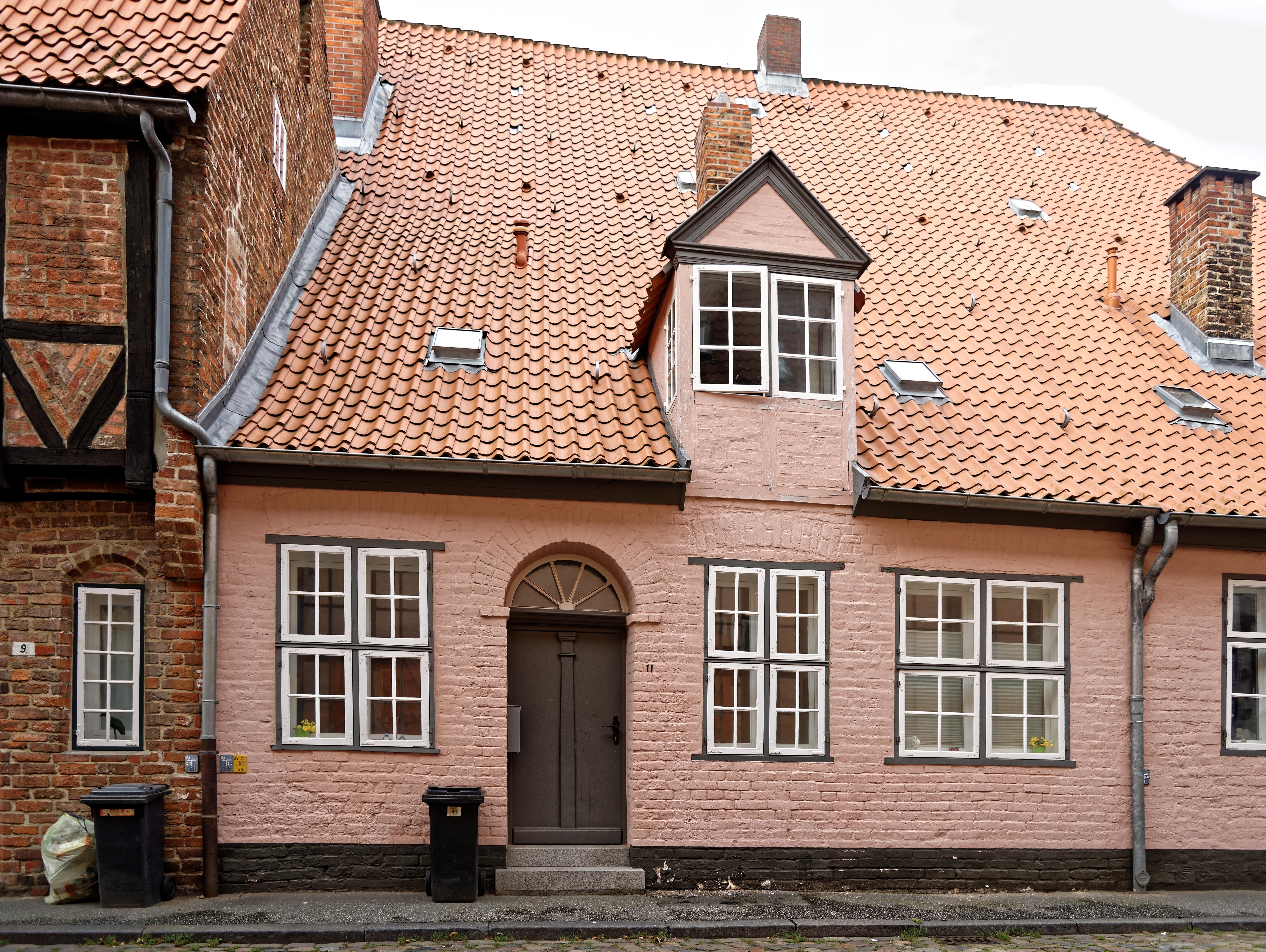 Lübecker Altstadt, Düvekenstraße 11